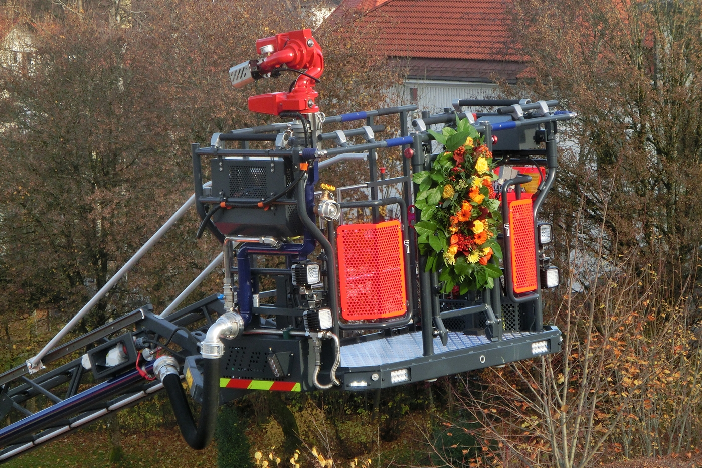 geschmückter Rettungskorb für die Weihe der neuen Drehleiter mit Korb (DLK 23/12) der FF Lindenberg im Allgäu